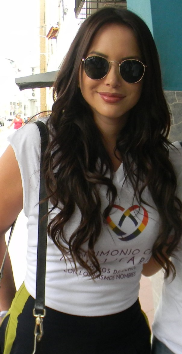 Erika Vélez durante la campaña por el matrimonio igualitario en Ecuador